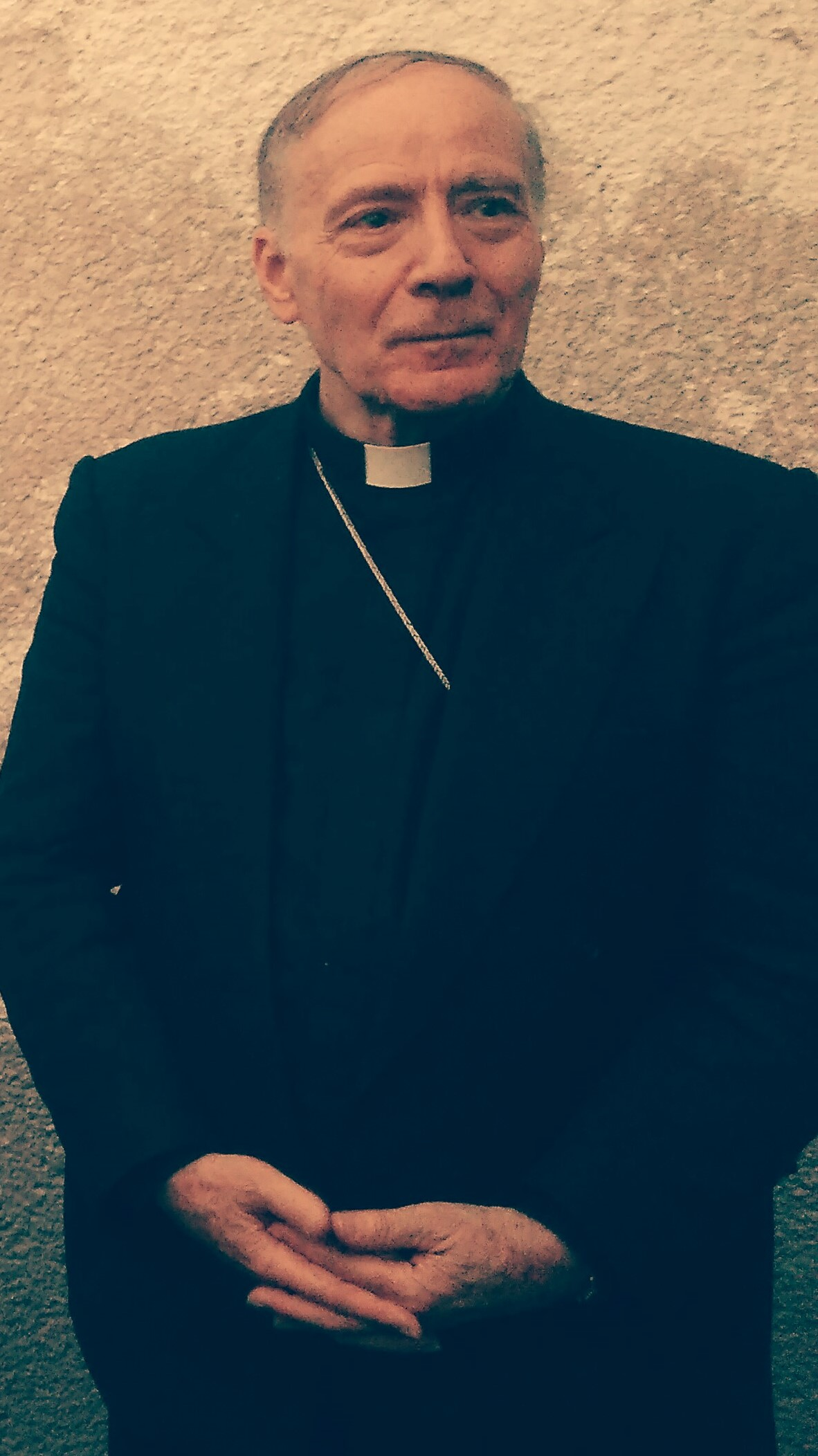 Apoštolský nuncius SR Mons. Giacomo Guido Ottonello